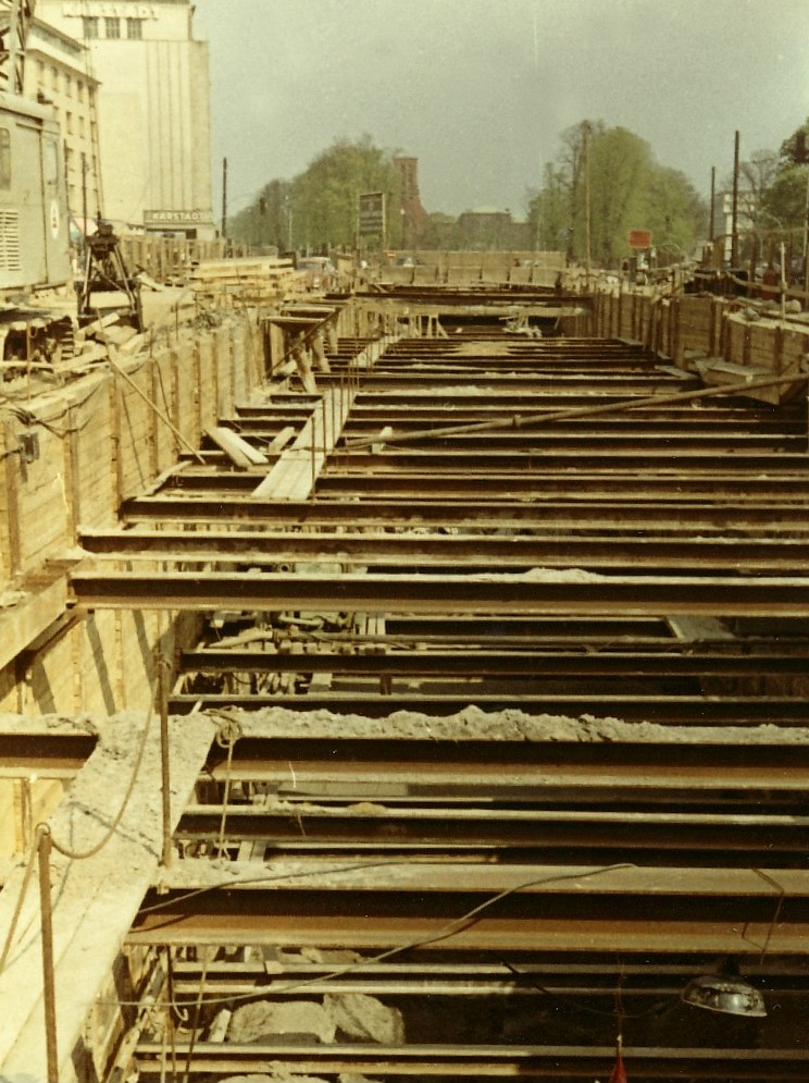 U-Bahnbau auf der Wandsbeker Marktstr. im offenen Schacht 1961-62